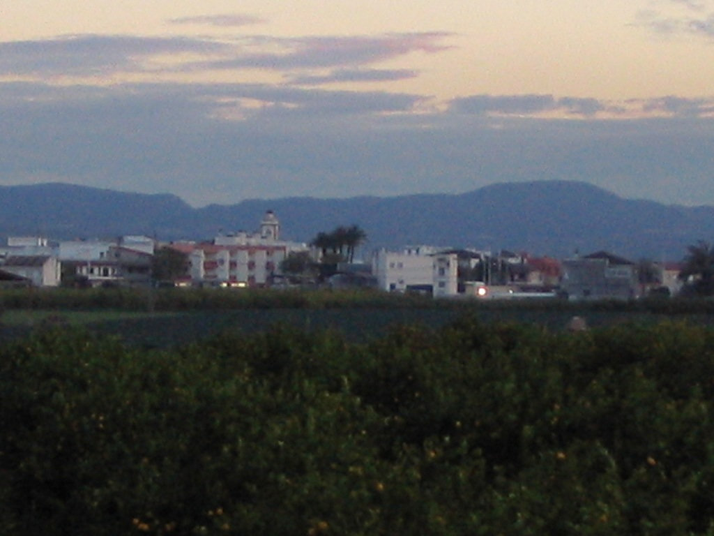 Vista del poble de Desemparats. Oriola.